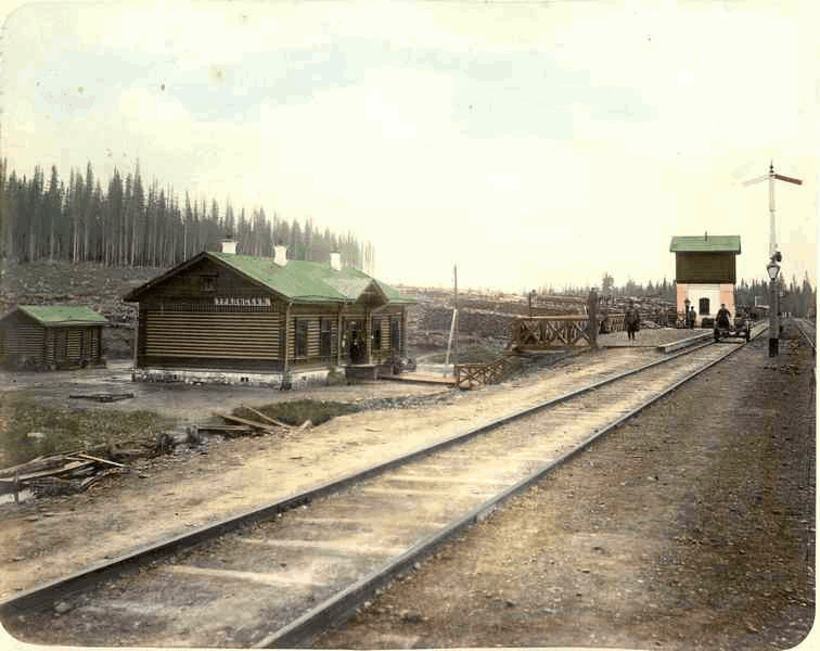 Станция Уральская Уральской Горнозаводской ж. д. Дореволюционная открытка